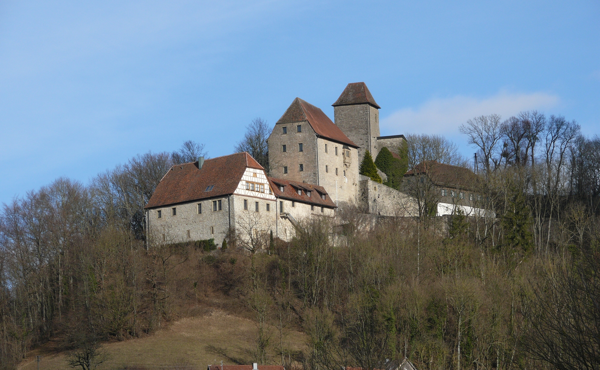 Schloss Tierberg, Braunsbach, Germany